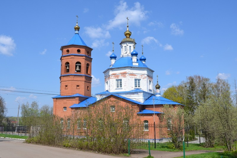 Залегощенская церковь.